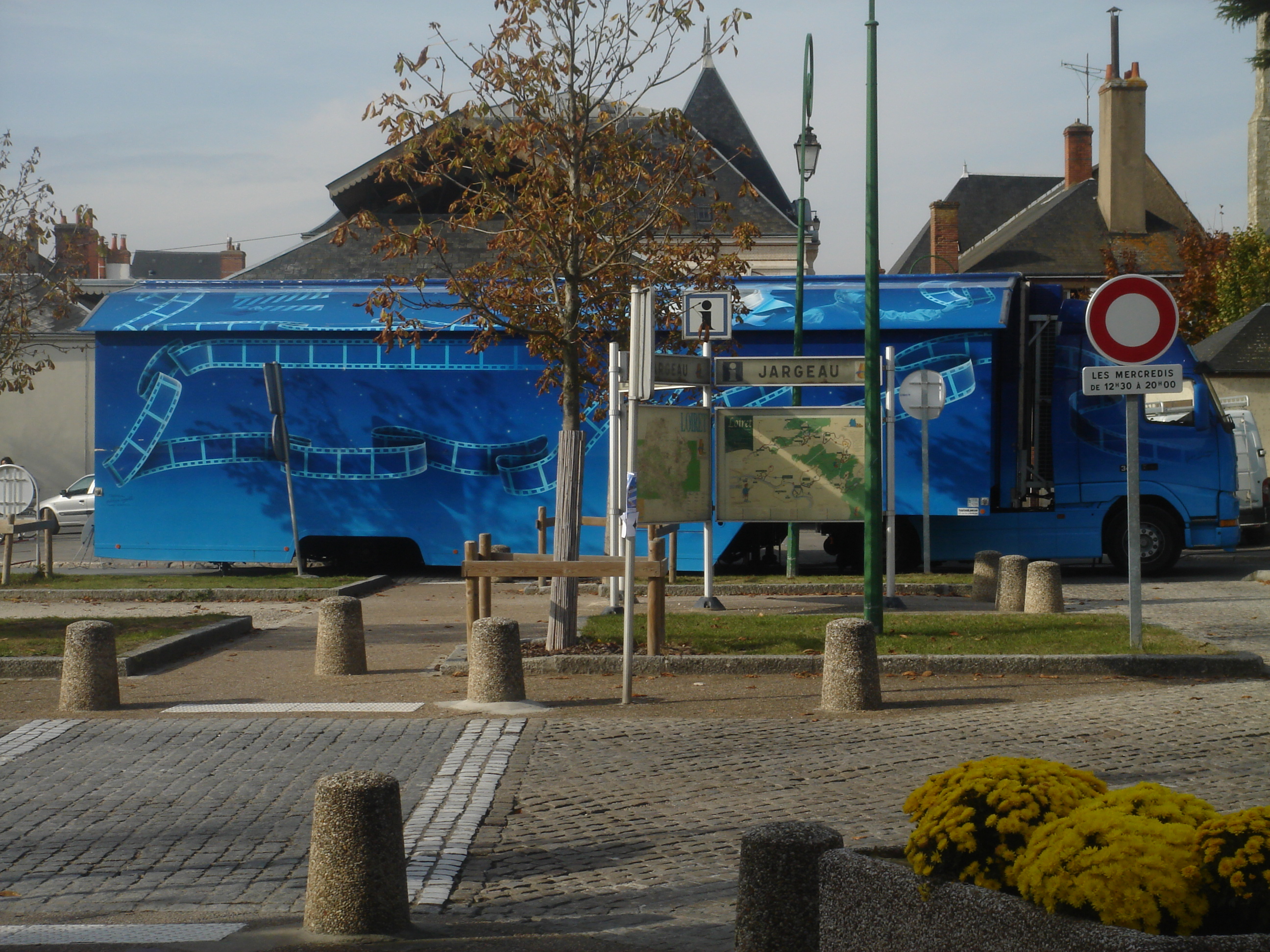 Le cinémobile sur le boulevard Carnot à Jargeau, Loiret, Centre, France